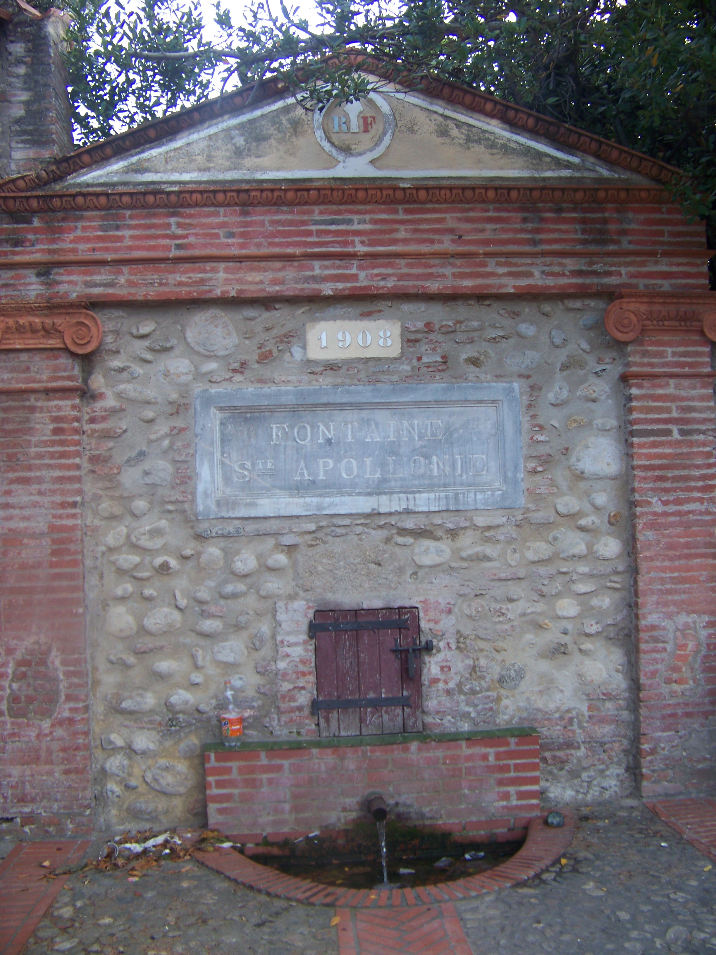 Font Apolònia de Sant Feliu d'Amunt